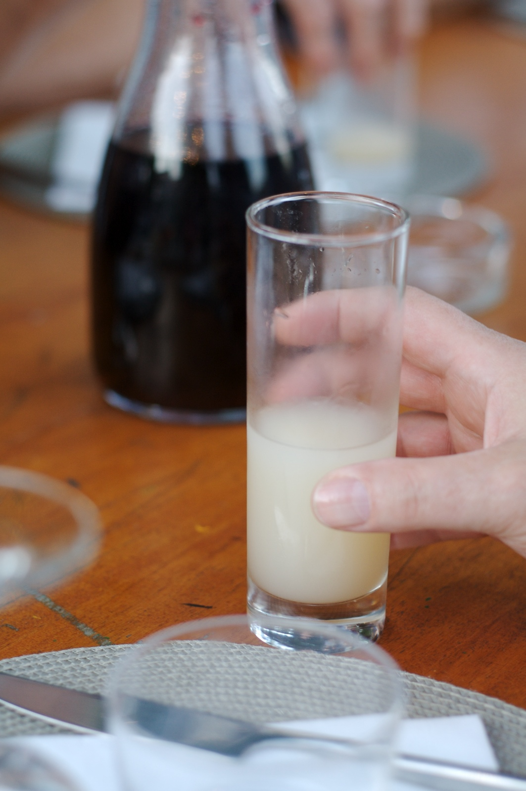 Pastis Ricard à Méjanes en Camargue